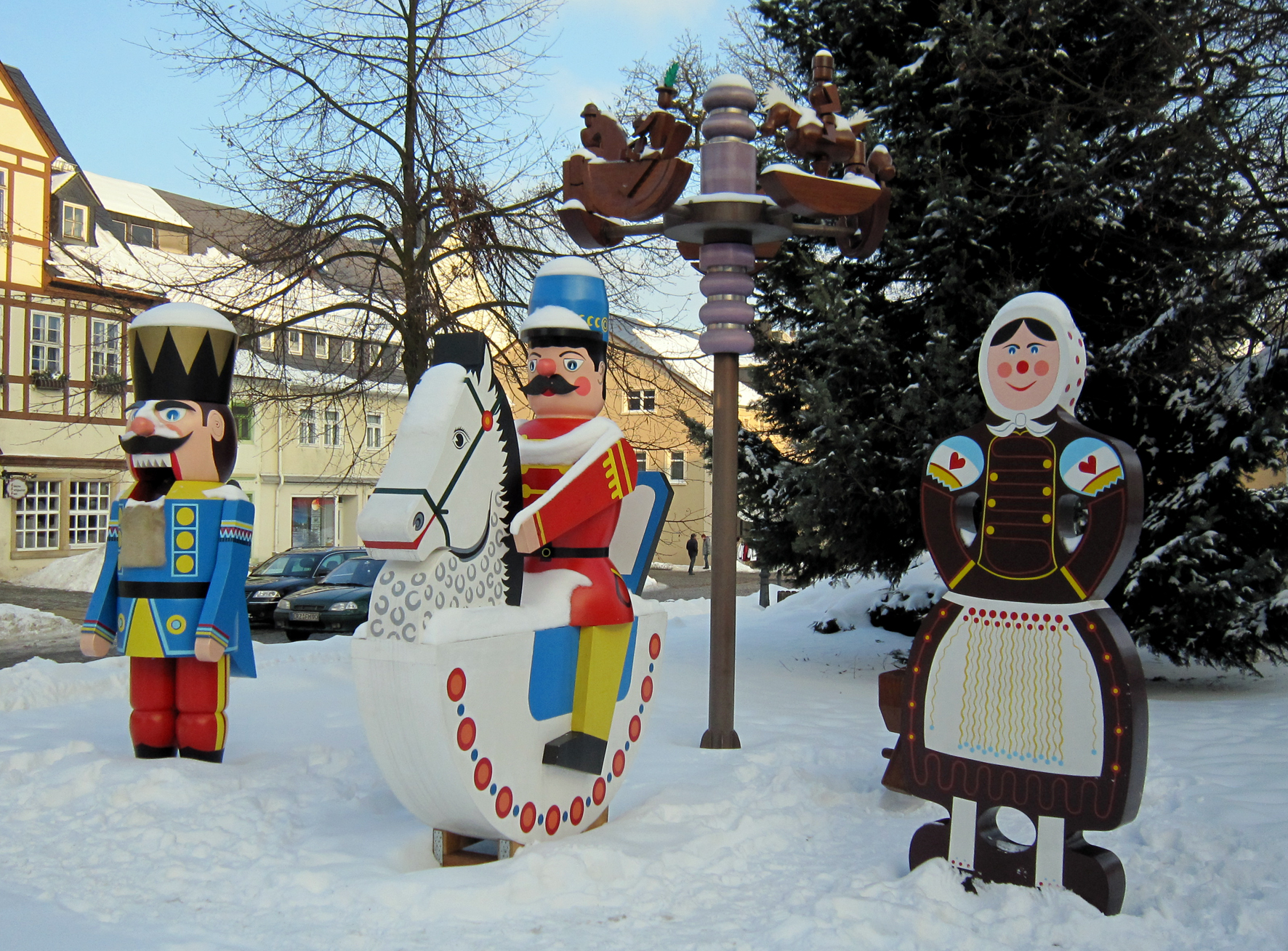 Olbernhau, Die Maskottchen am Markt